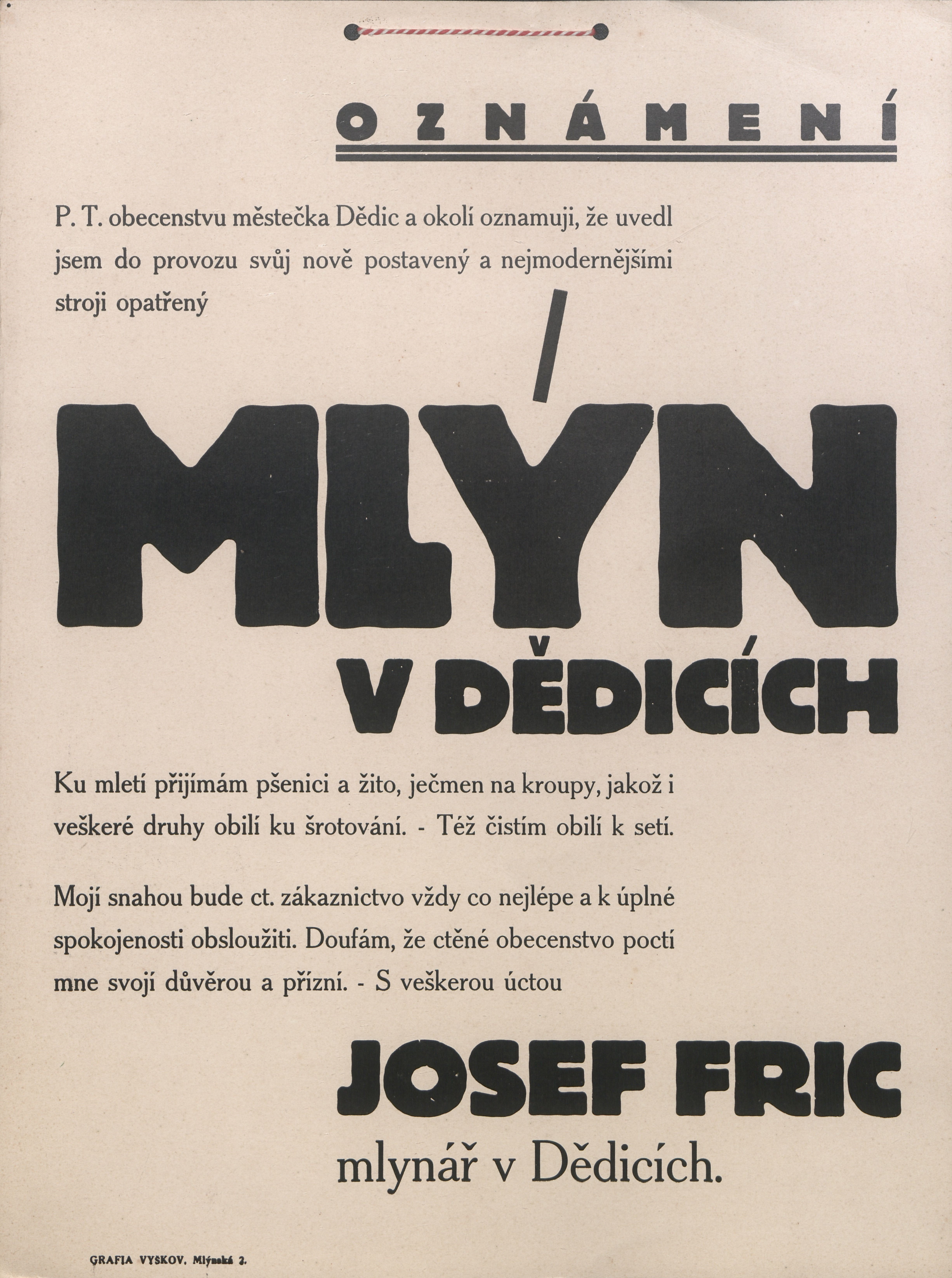 Oznámení. Mlýn v Dědicích. Josef Fric, mlynář v Dědicích: "Oznámení P. T. obecenstvu městečka Dědic a okolí oznamuji, že uvedl jsem do provozu svůj nově postavený a nejmodernějšími stroji opatřený Mlýn v Dědicích Ku mletí přijímám pšenici a žito, ječmen na kroupy, jakož i veškeré druhy obilí ku šrotování. - Též čistím obilí k setí. Mojí snahou bude ct. zákaznictvo vždy co nejlépe a k úplné spokojenosti obsloužiti. Doufám, že ctěné obecenstvo poctí mne svojí důvěrou a přízní. - S veškerou úctou Josef Fric mlynář v Dědicích. Grafia Vyškov, Mlýnská 2." Datace: nedatováno (odhad: nejdříve po rekonstrukci dokončené v roce 1931)